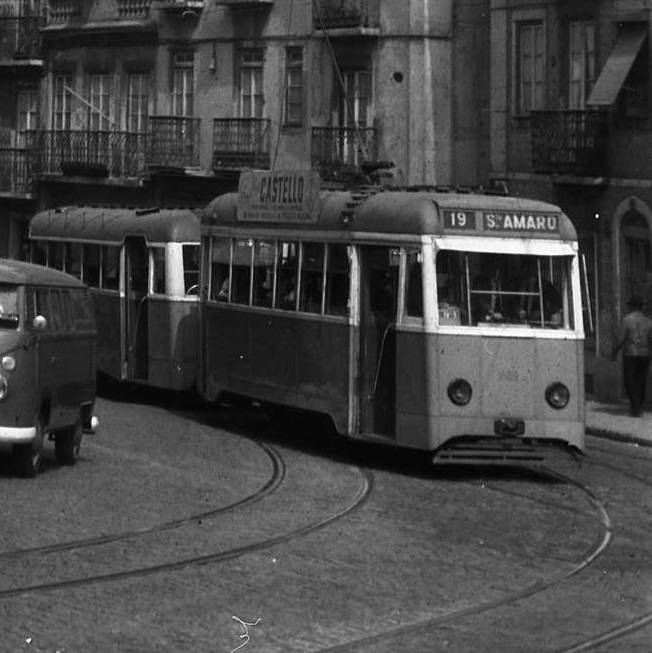 Bonde de Lisboa